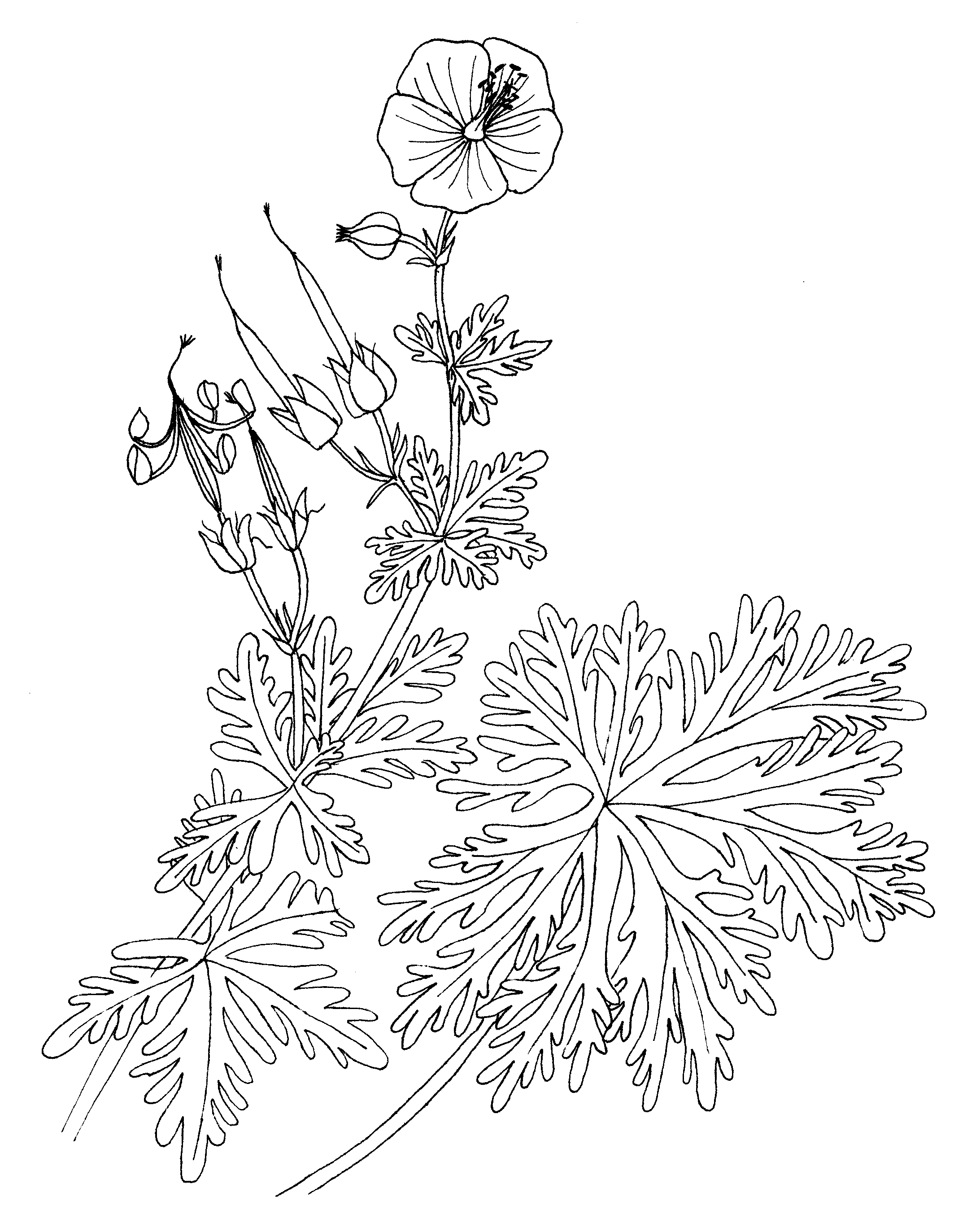 Geranium pratense, Near York, England, August, 16, 1977 Beemdooievaarsbek Pen drawing on paper by Elly Waterman Pentekening op papier door Elly Waterman